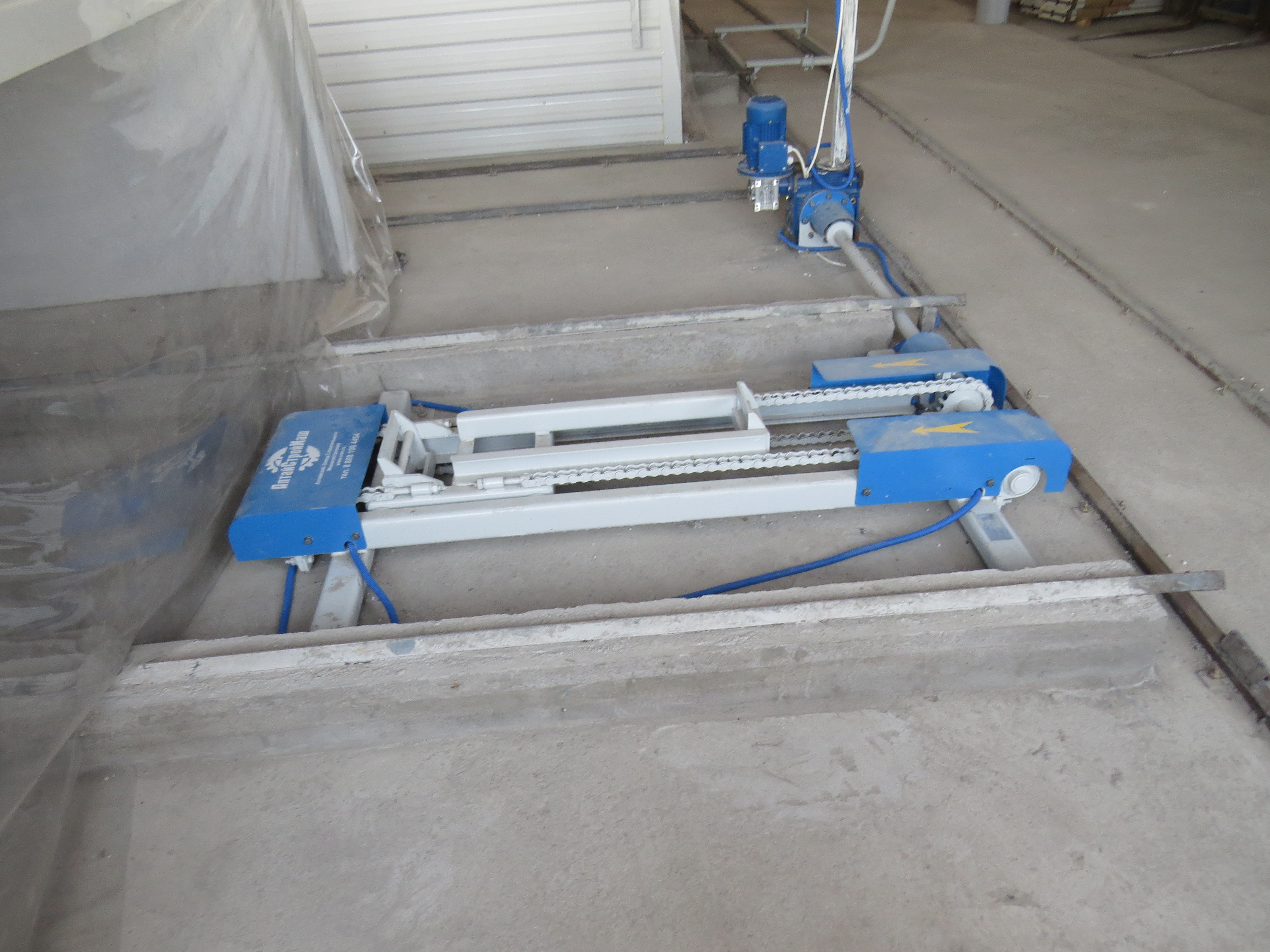 для газобетона